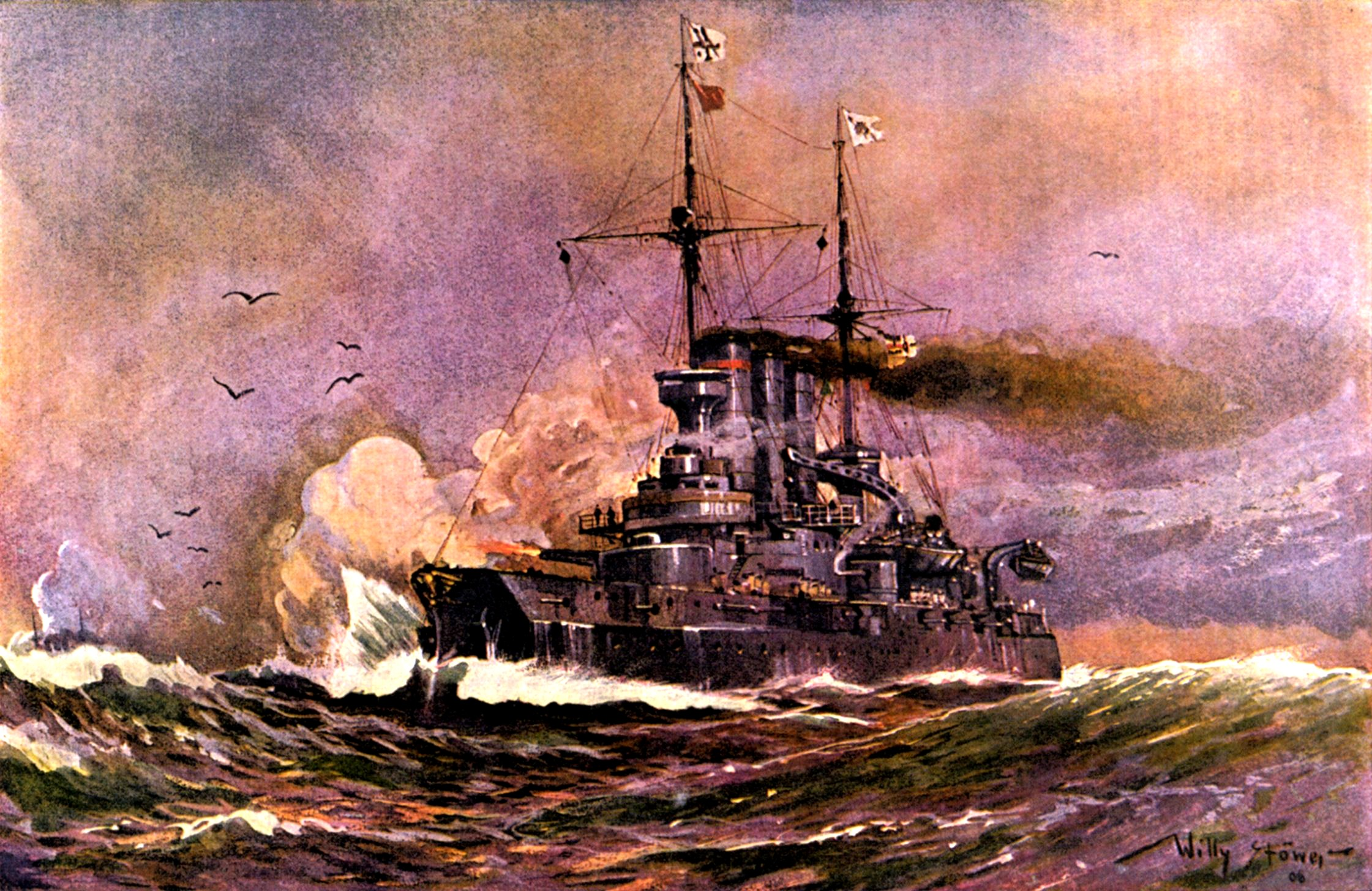 Panzerschiff Preußen in voller Fahrt feuernd